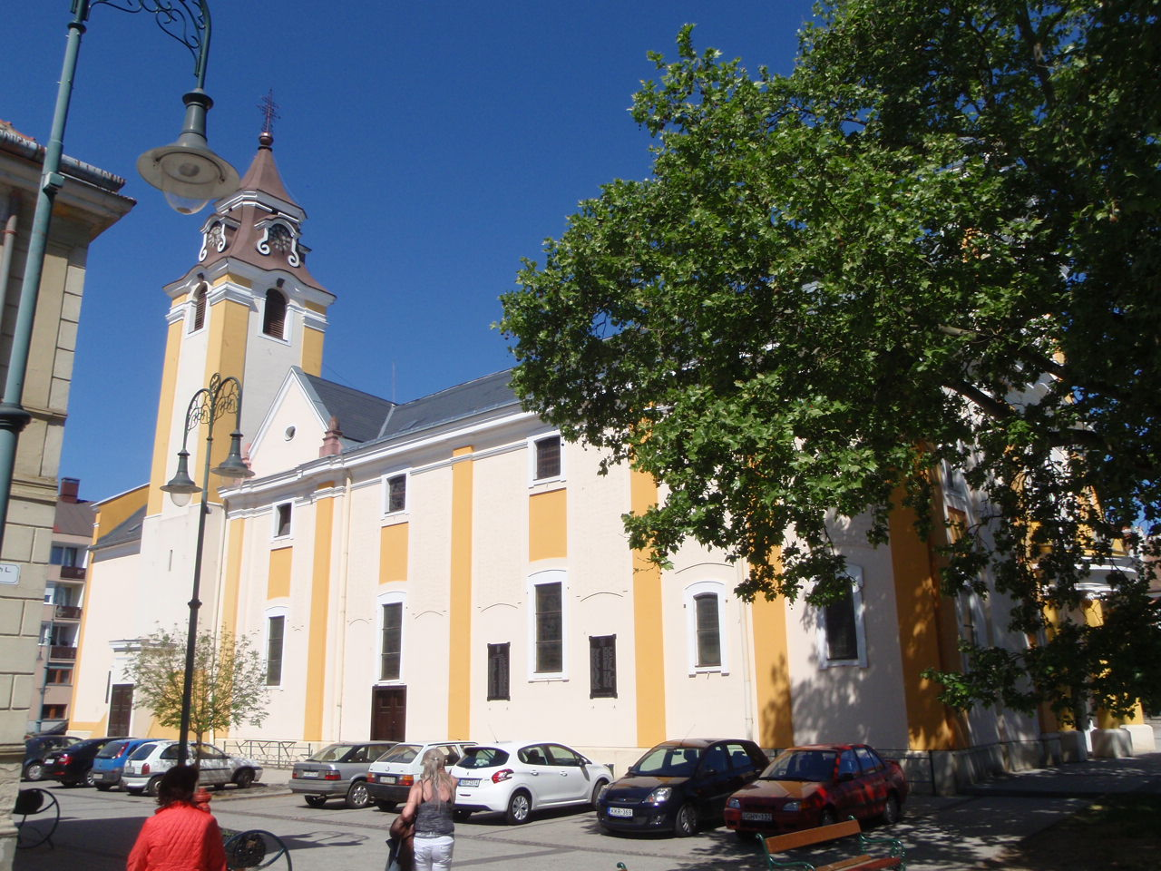 Szent László templom Sárvár